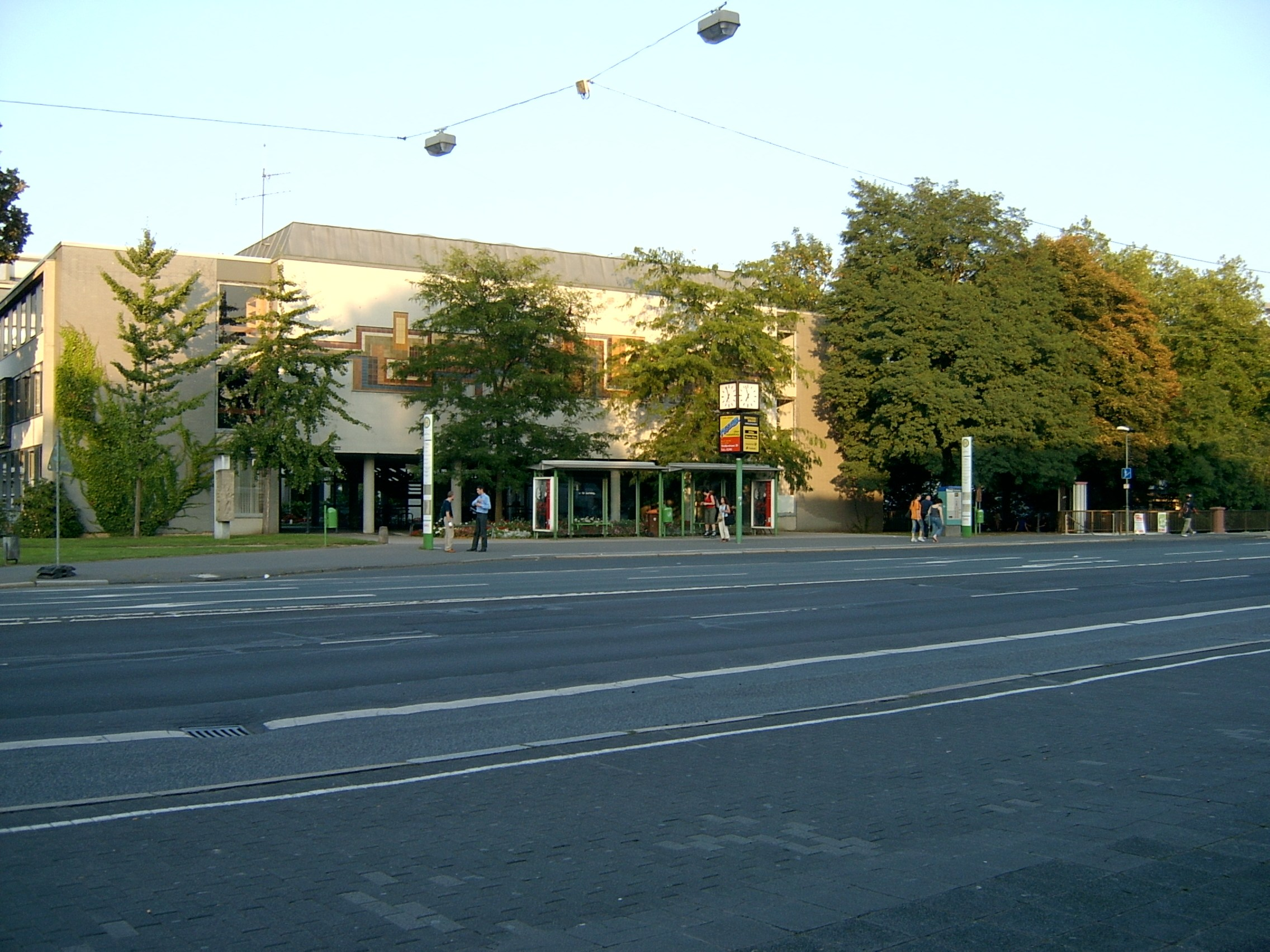 Der Berliner Platz in Gießen. Das Gebäude ist im Jahr 2007 bereits verschwunden.